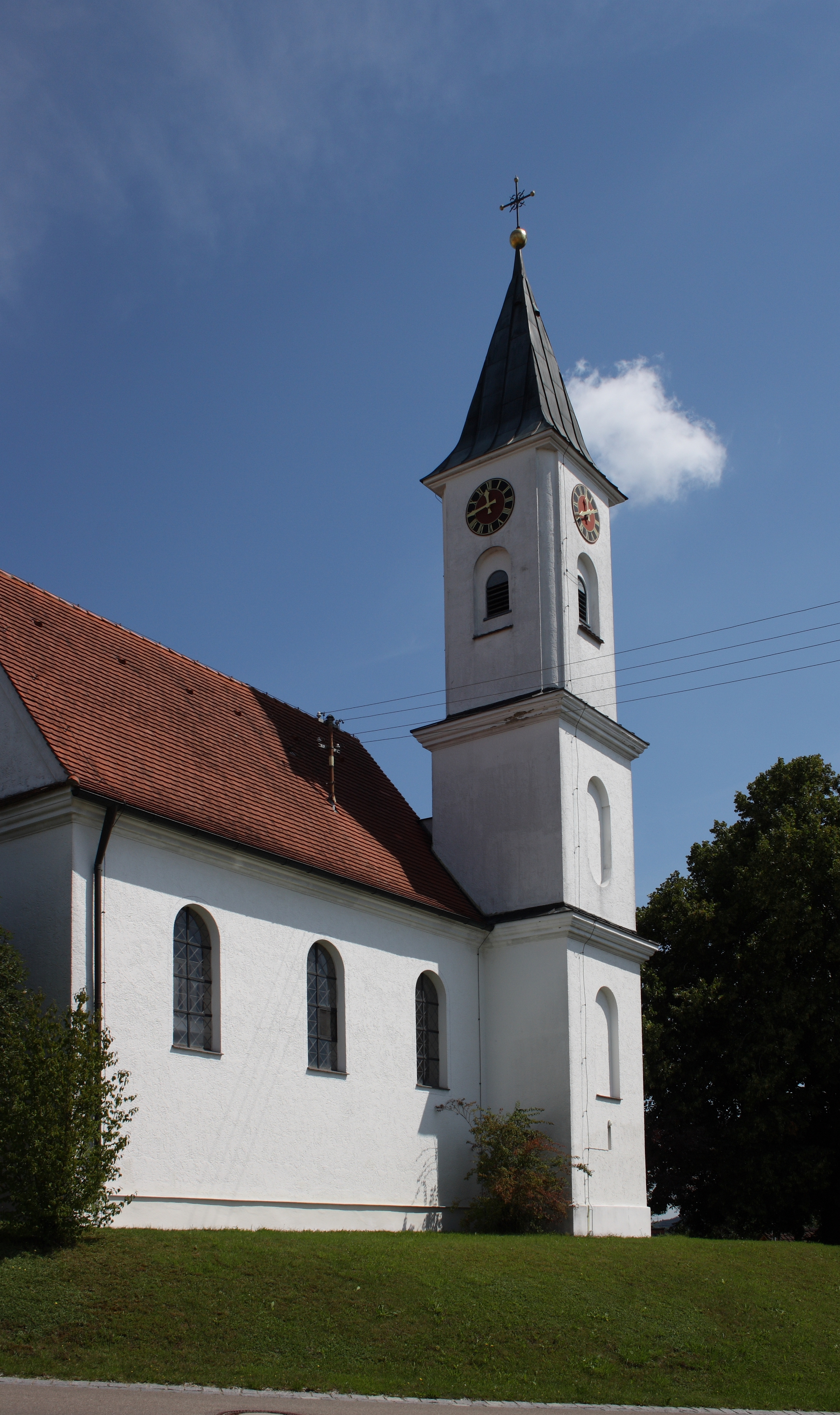 Katholische Filialkirche St. Stefan in Sontheim, einem Ortsteil von Zusamaltheim im Landkreis Dillingen an der Donau (Bayern)